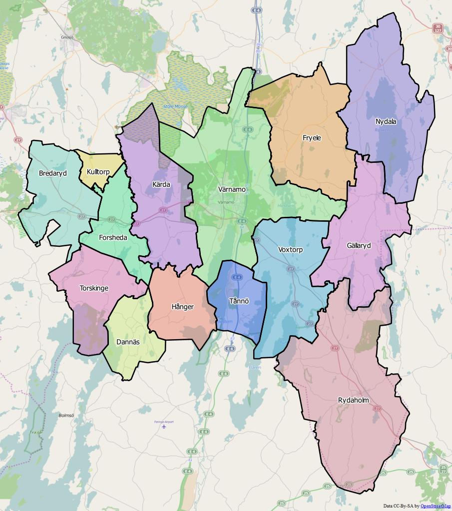 Distriktsindelningen i Värnamo kommun World file 107.13325967178666076 0 0 -107.13325967178666076 1514633.21385964588262141 7841320.10260934568941593